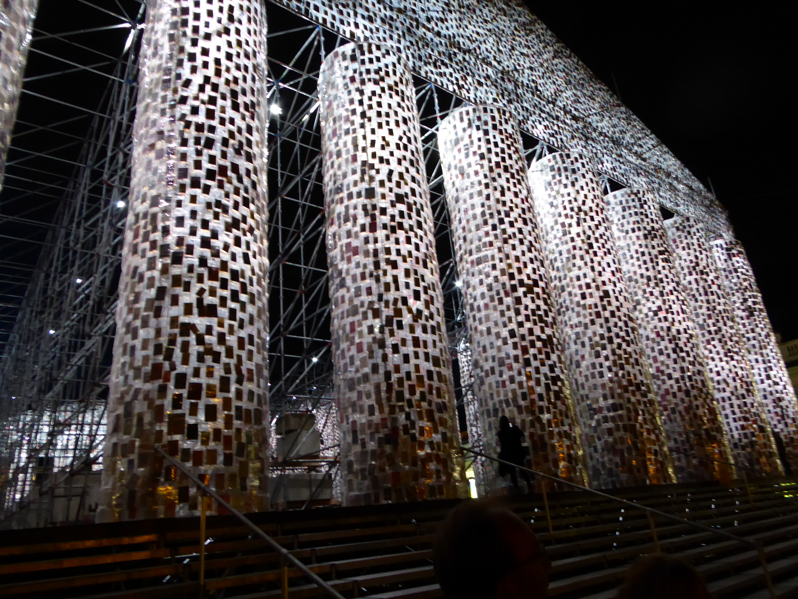 Der Parthenon der Bücher , einer der Hauptkunstwerke der documenta 2017 auf dem Friedrichsplatz in Kassel. Angestrahlt bei Nacht. Kunstwerk von Marta Minujin